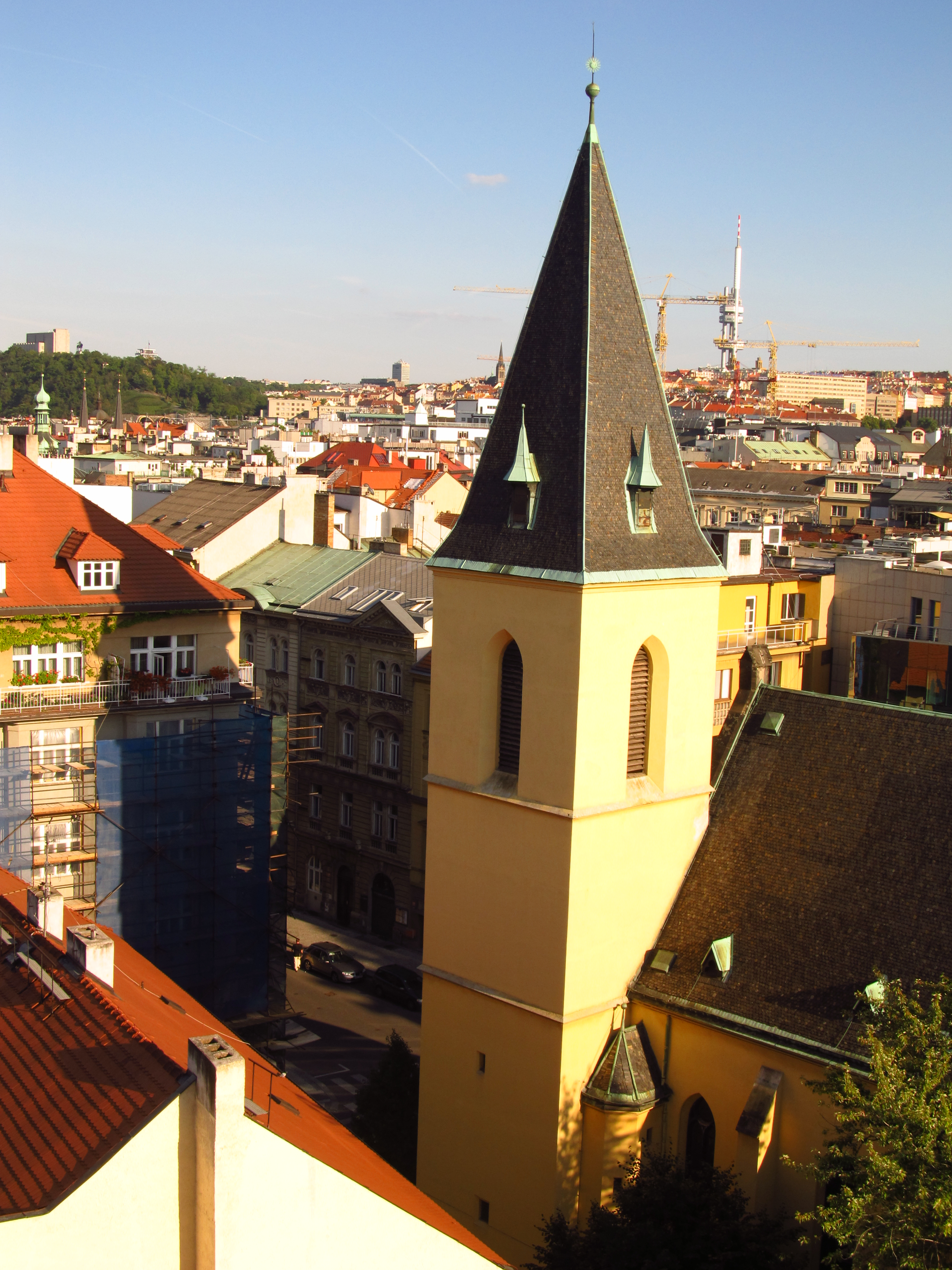 Česky: Pohled z Novomlýnské vodárenské věže na kostel sv. Klimenta.